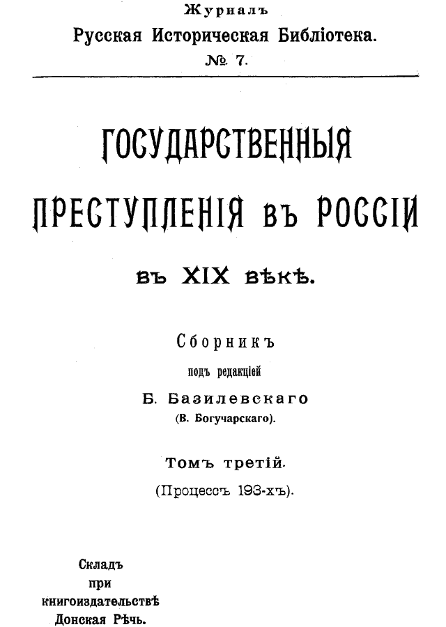 В. Богучарский, «Государственные преступления в России», 1906 г.